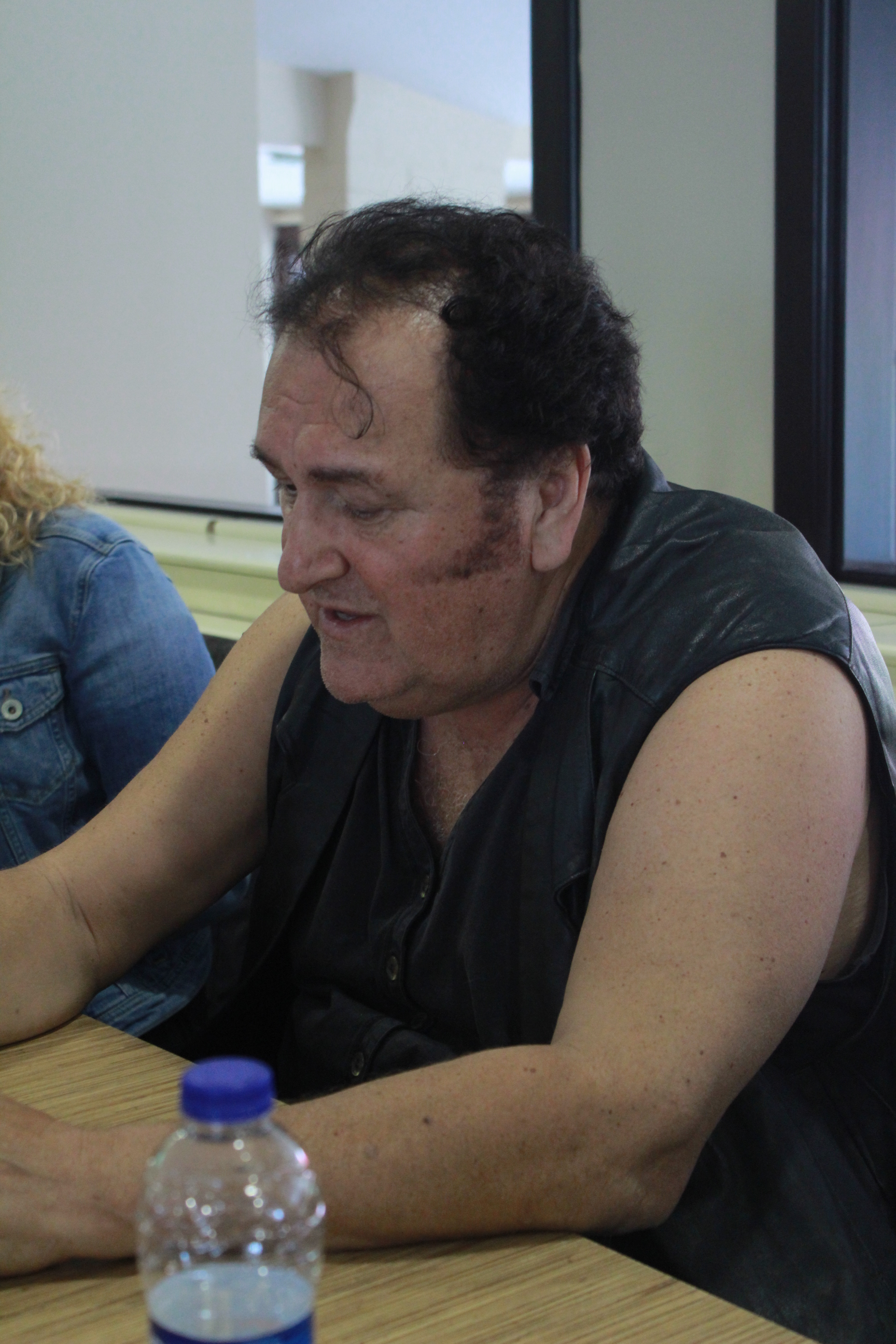 Asım Can Gündüz, Bilkent Üniversitesi'nde